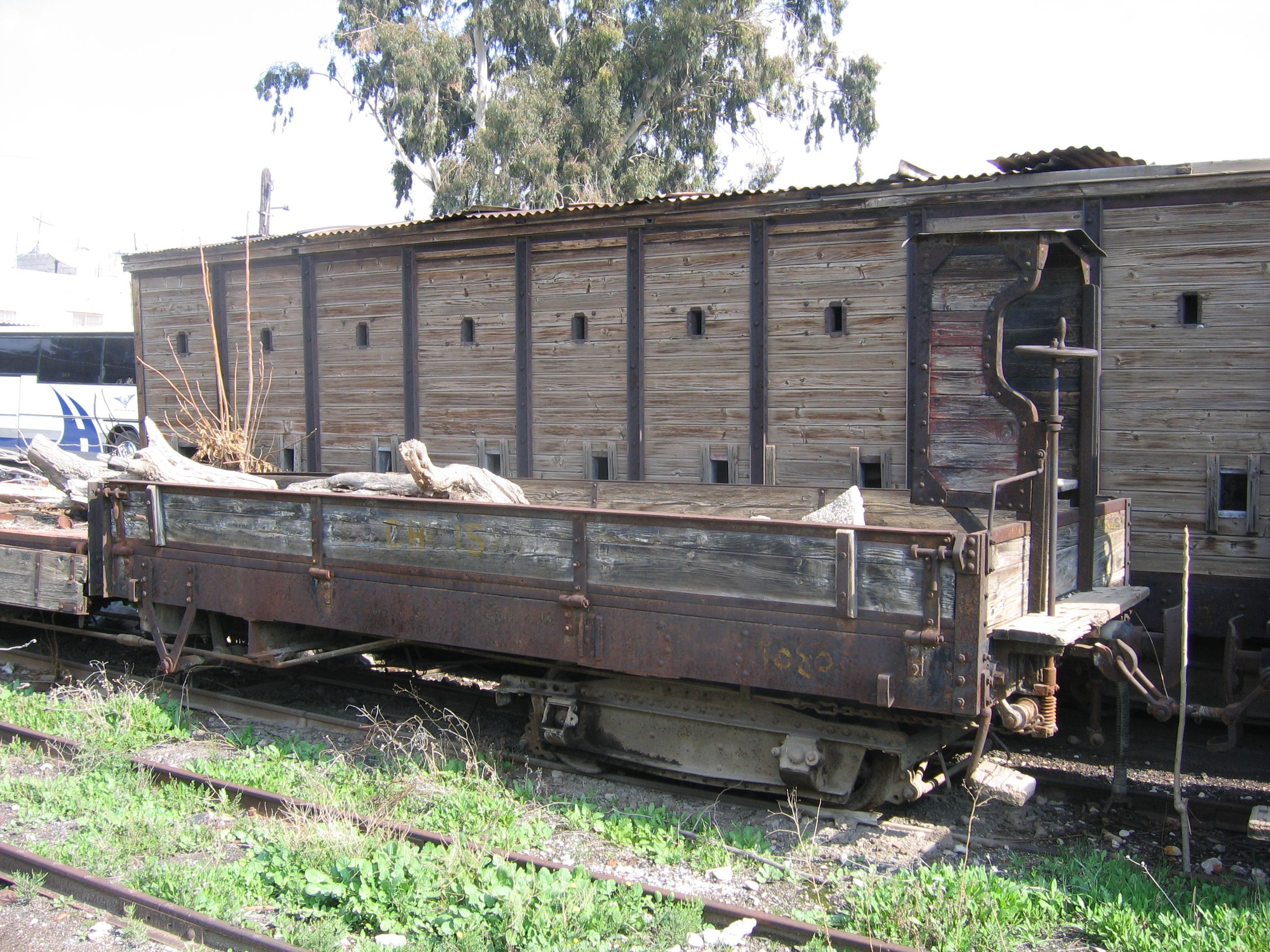 Gepanzerter Zugbegleitwagen aus der Zeit des französischen Mandats über Syrien. Abgestellt im Bw Damaskus-Kadam